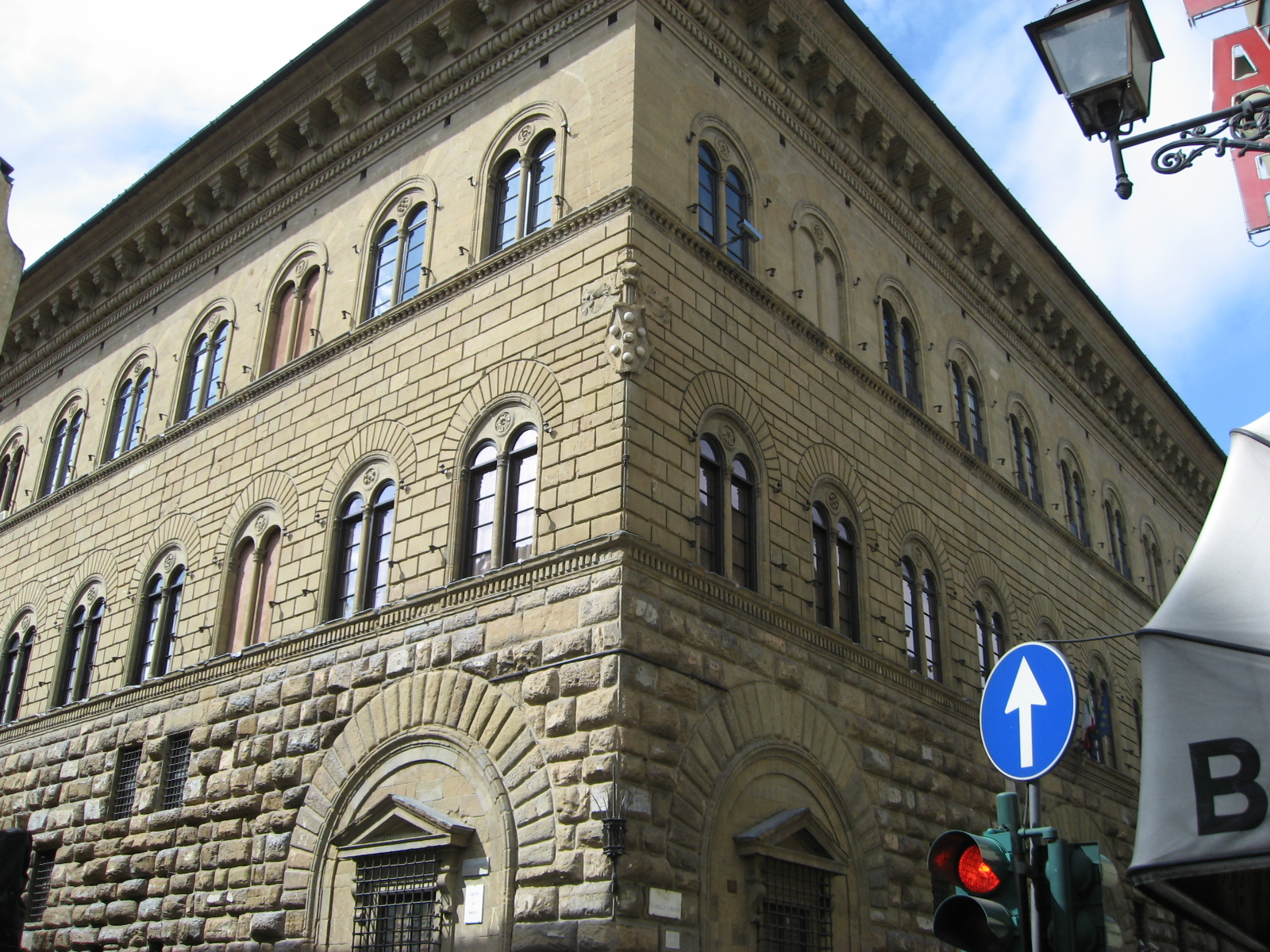 Palazzo Medici-Riccardi